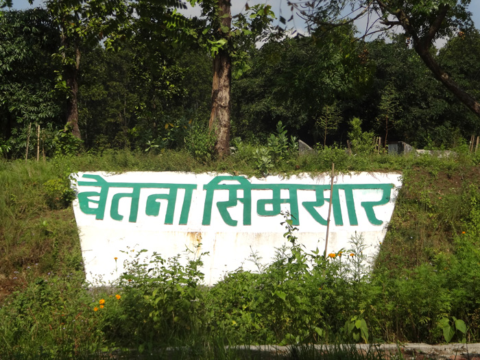 नेपाली: betana simsar